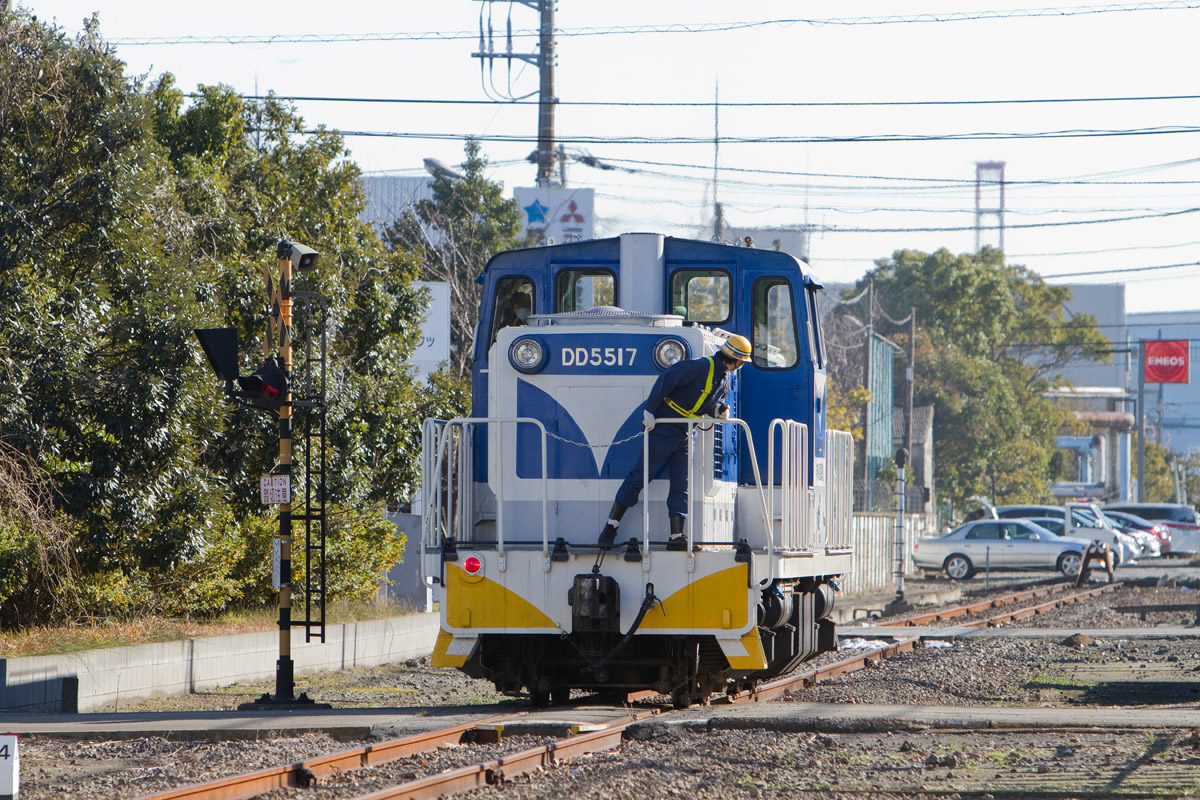 神奈川臨海鉄道水江線をゆく線路保全列車